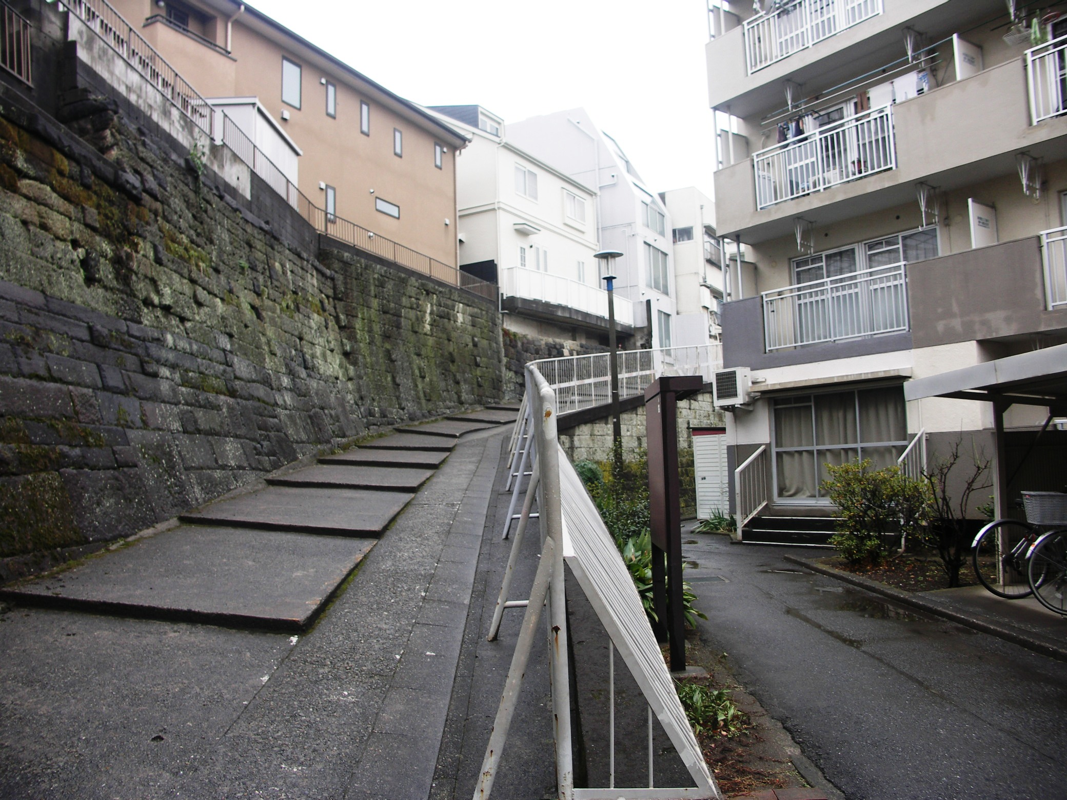 東京都新宿区市谷長延寺町・都営長延寺アパート裏。左側の階段状の坂を上がっていった崖上は左内町。